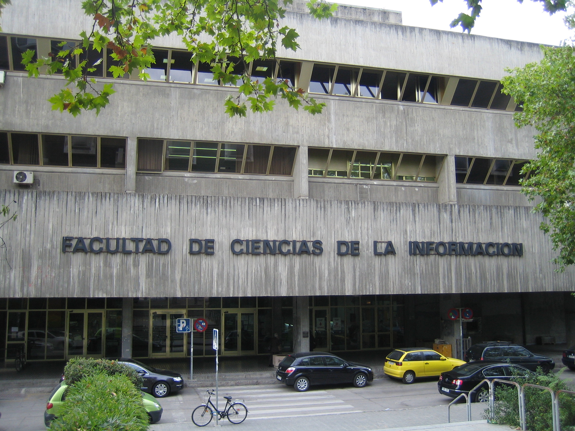 Madrid. 10/22/2007. Autor: Antonio Peiró. 2.272x1.704 px (1,2 MB)